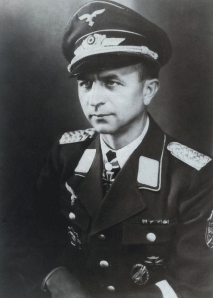 Историческое фото Вальтера Эриха,на фотосессии.